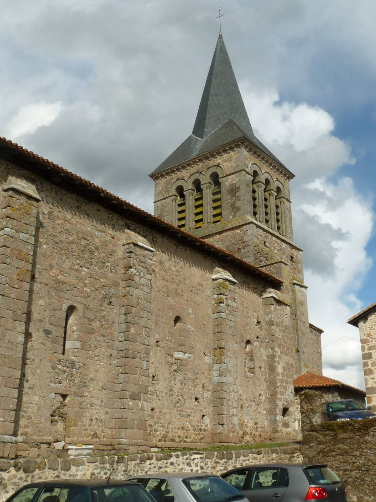 église de La Péruse, Charente, France